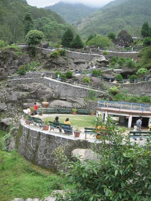 Darjeeling: Rock Garden